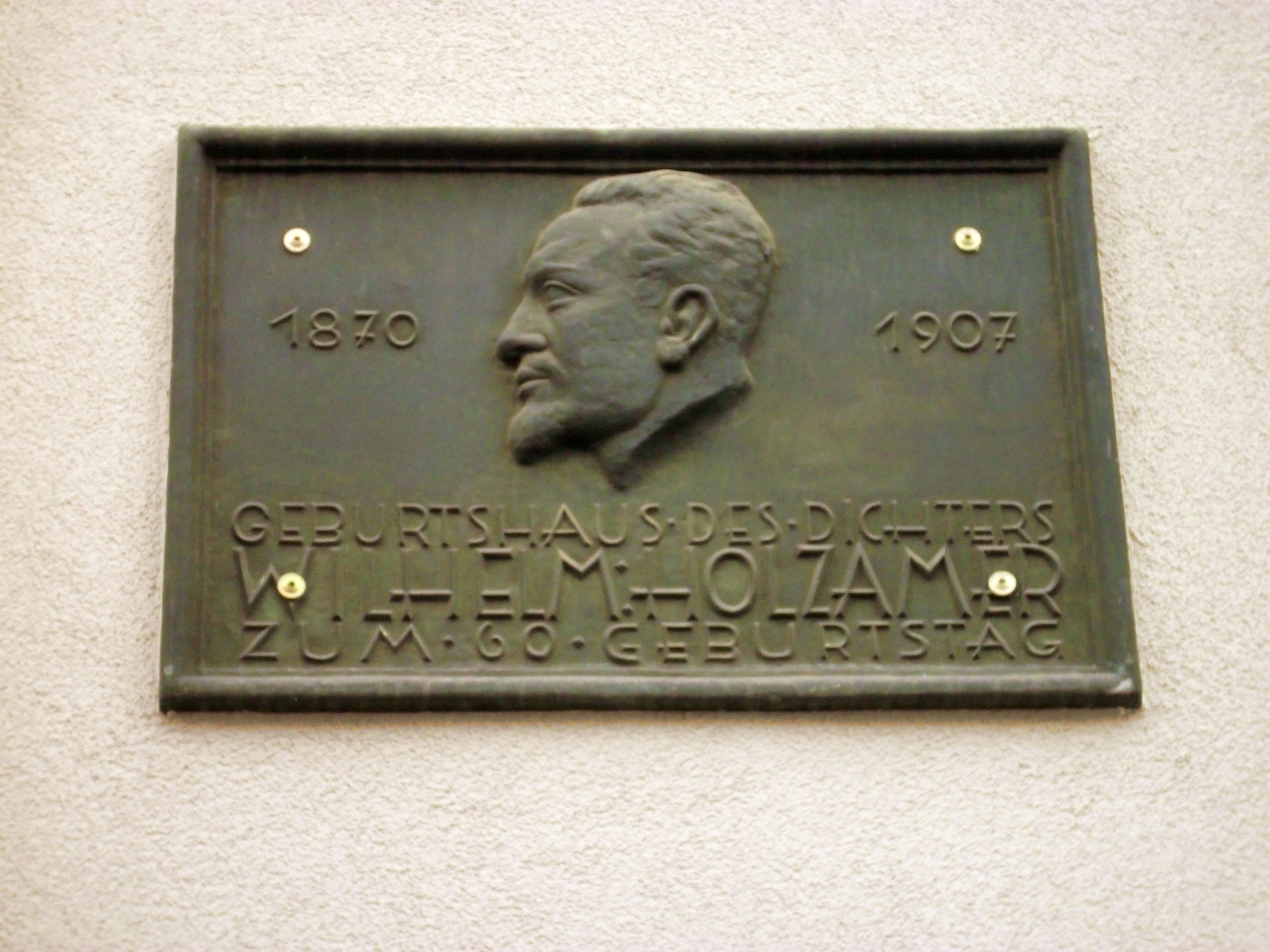 Gedenktafel, Bronze, Profilbildnis Wilhelm Holzamer, Bildhauer Heinz Müller-Olm, Nieder-Olm